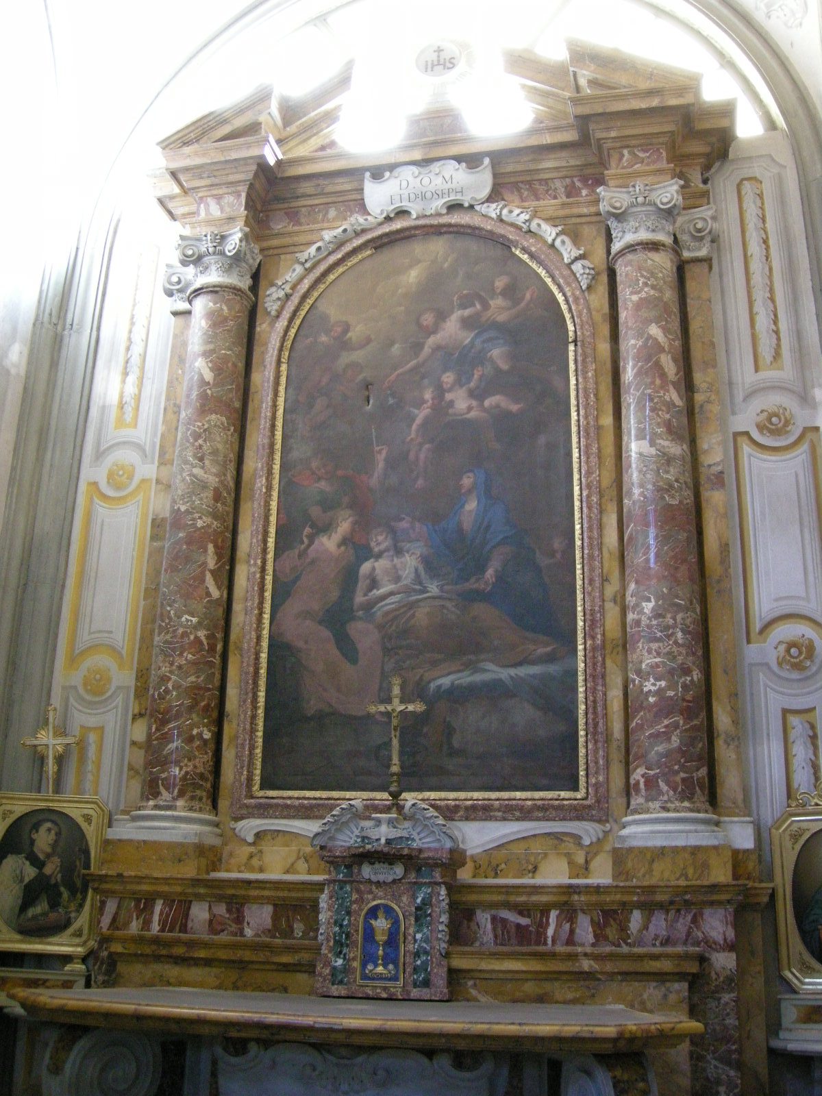 Badia fiesolana, interno, cappella affrescata